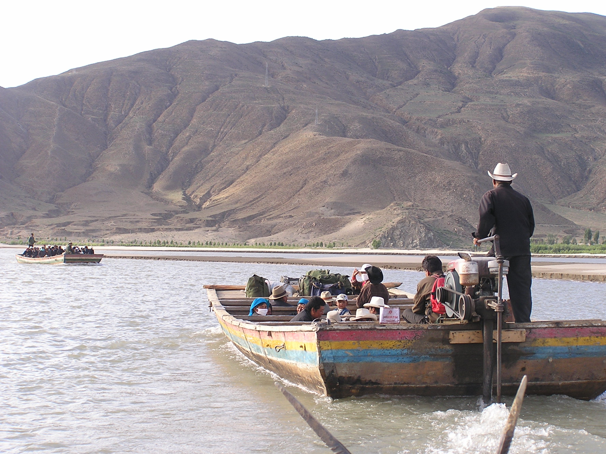 Brahmaputra 6